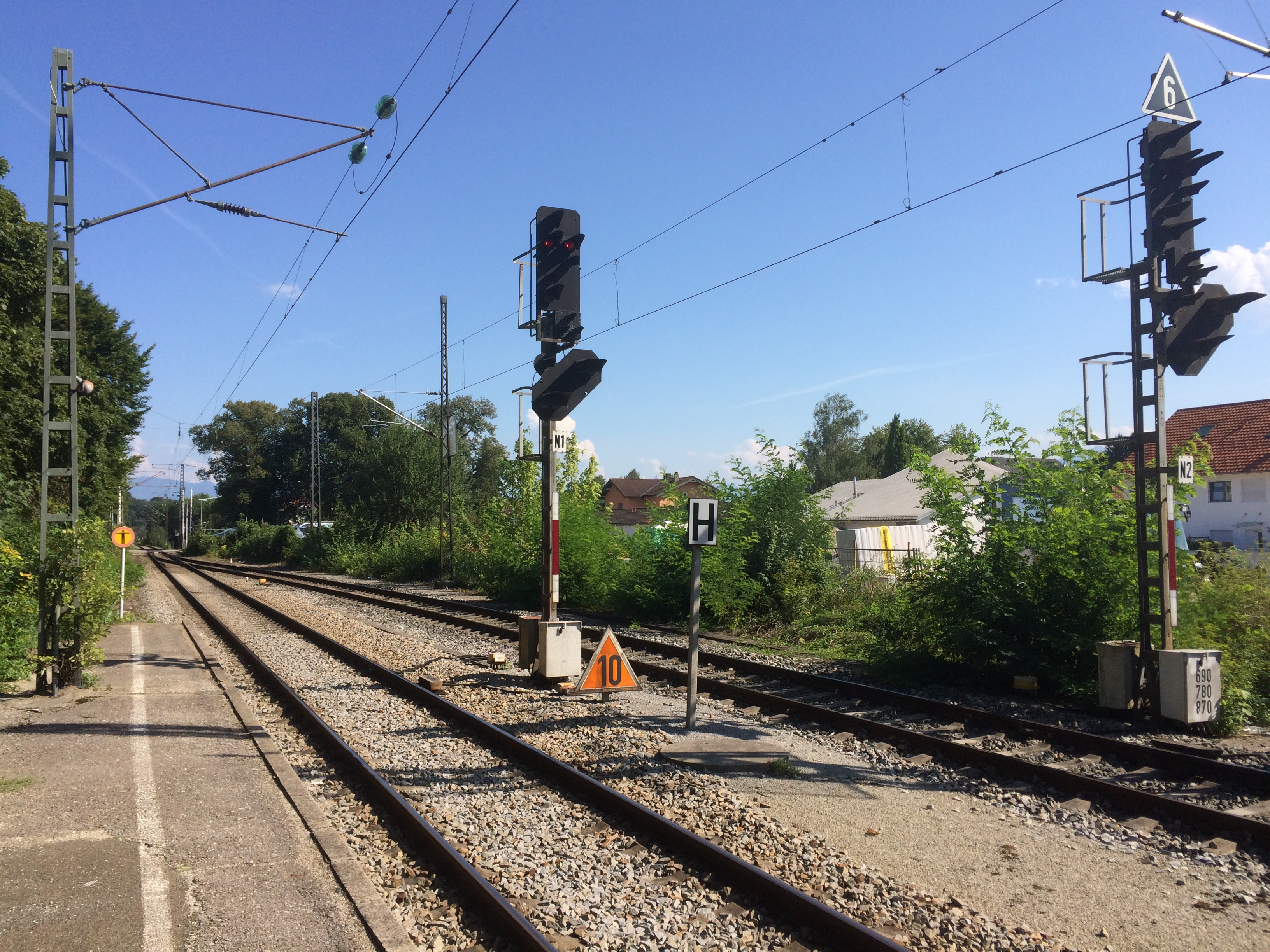 Am Ausfahrsignal N1 im Bahnhof Bad Aibling wurde das Signal Zs 1 - Ersatzsignal bedient.